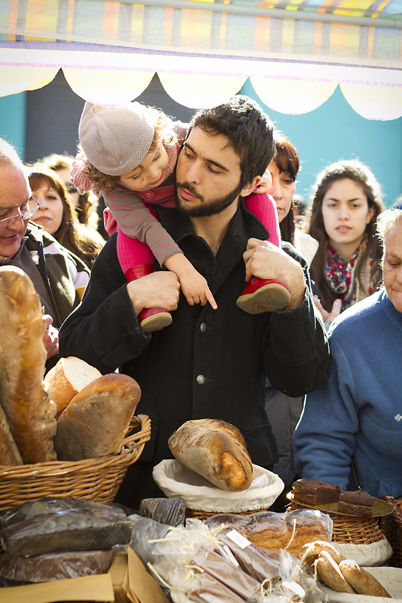 Foto: Estrella Herrera